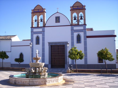 Imagen de la iglesia de El Rubio